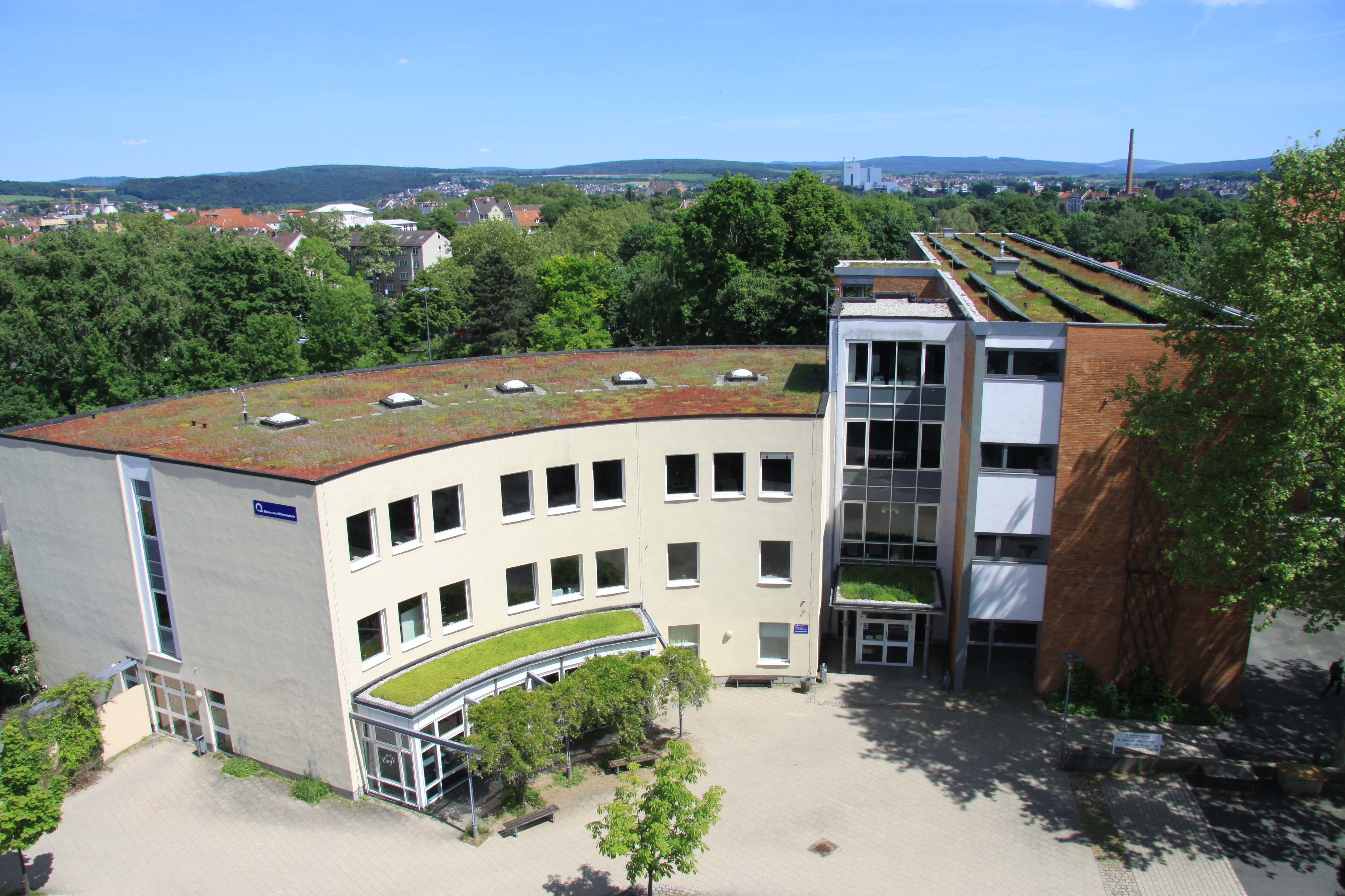 Hauptgebäude der Oskar-von-Miller-Schule in Kassel